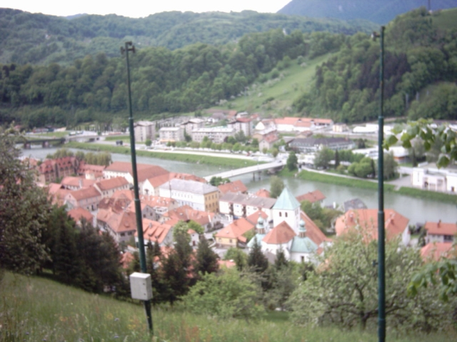 Pogled na LaÅ¡ko s severovzhodne strani - z gradu, slika xJaM, julij sl:2004.